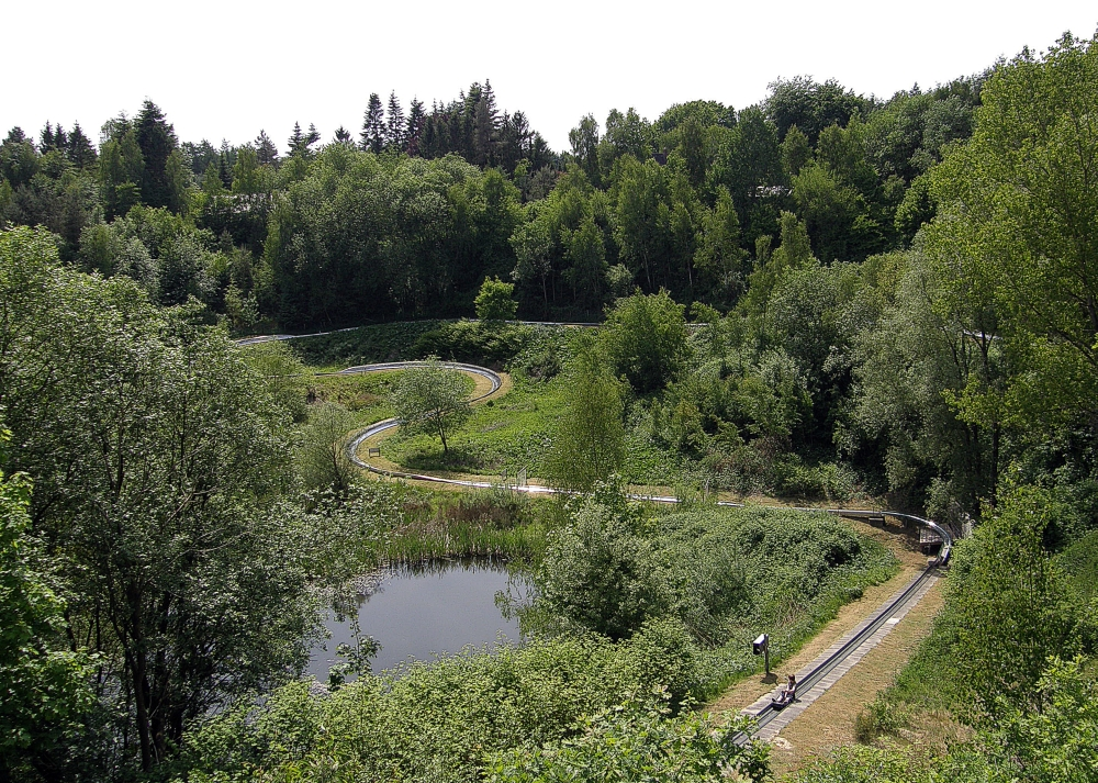 Der Wingster Sport und Freizeitpart im Frühling